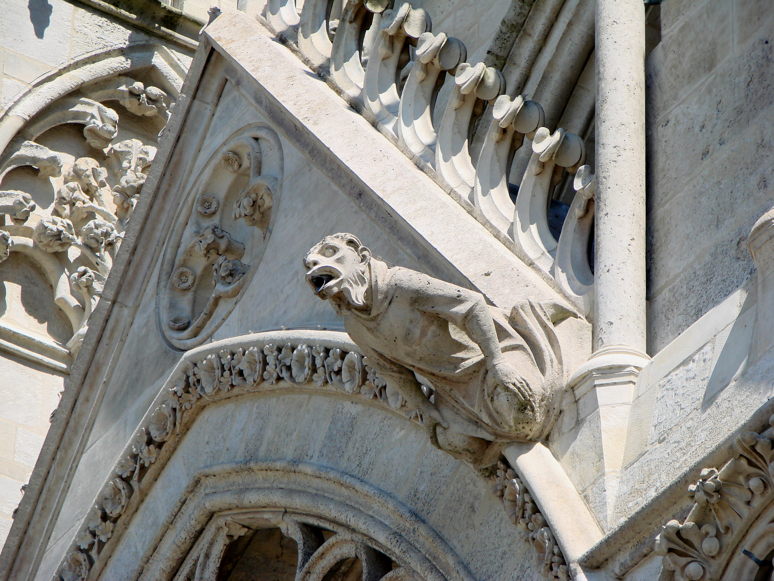 Cathédrale Notre-Dame d'Amiens.Une gargouille de la façade.